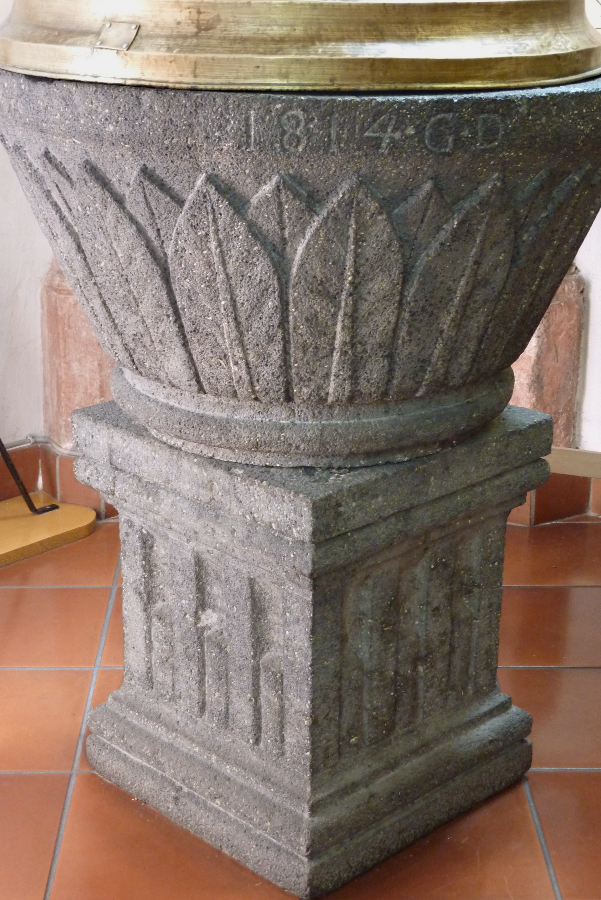 Katholische Pfarrkirche Heiligste Dreifaltigkeit in Monreal, Taufstein